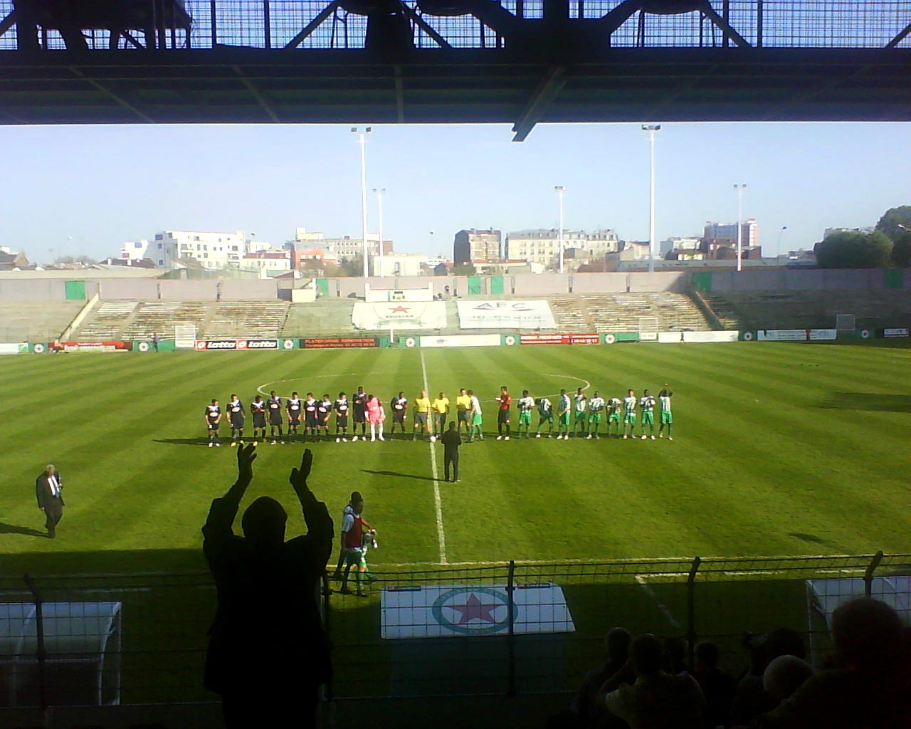 Présentation des équipes lors du match Red Star-Bordeaux B du 24 avril 2010 au stade Bauer